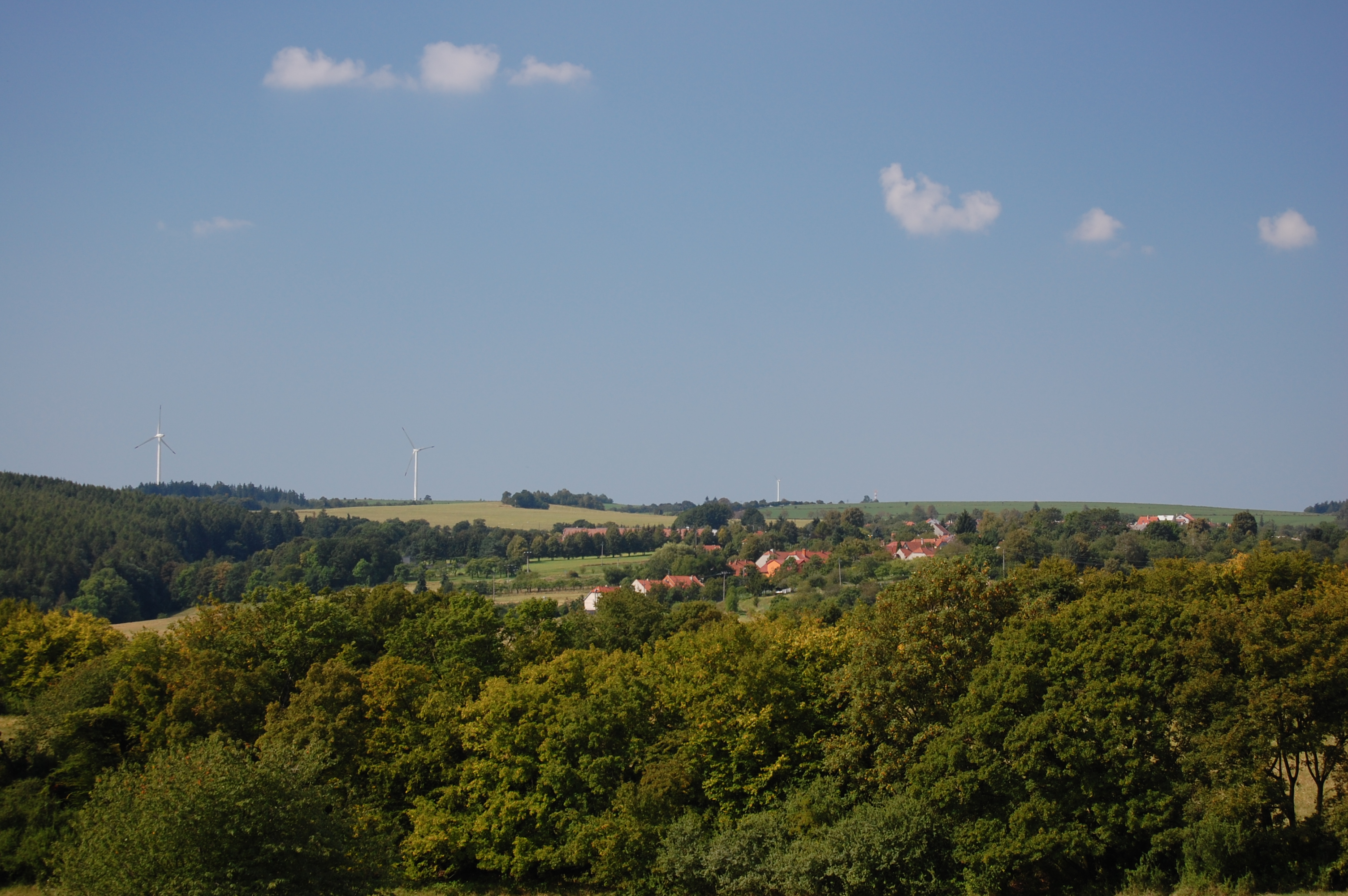 Pohled na obec ze Starého Hradiska, Malé Hradisko, okres Prostějov